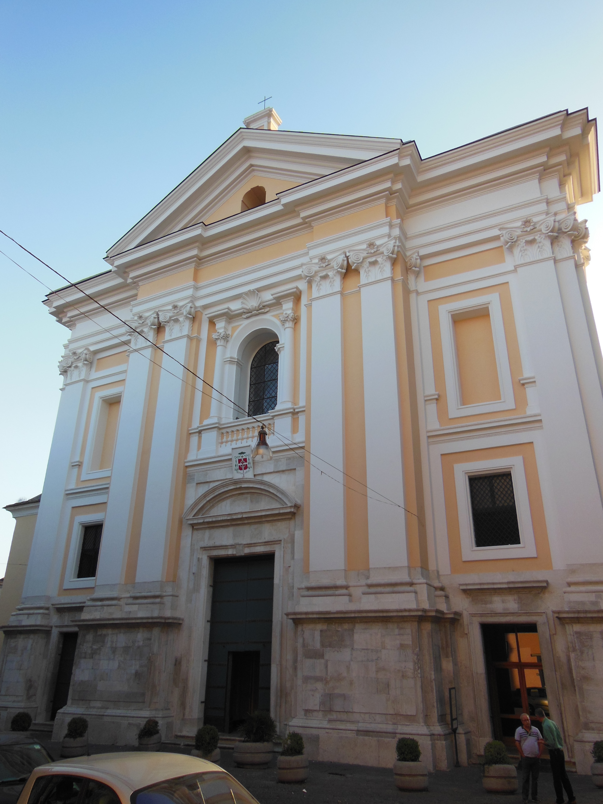 Opera propria